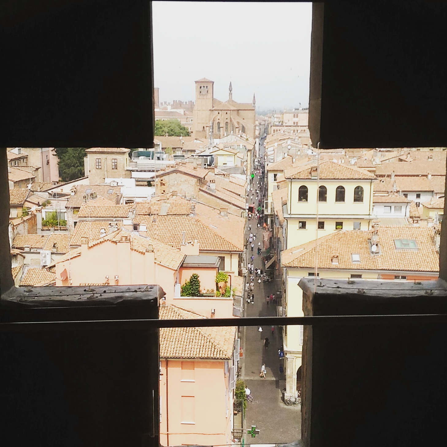 Duomo di Piacenza